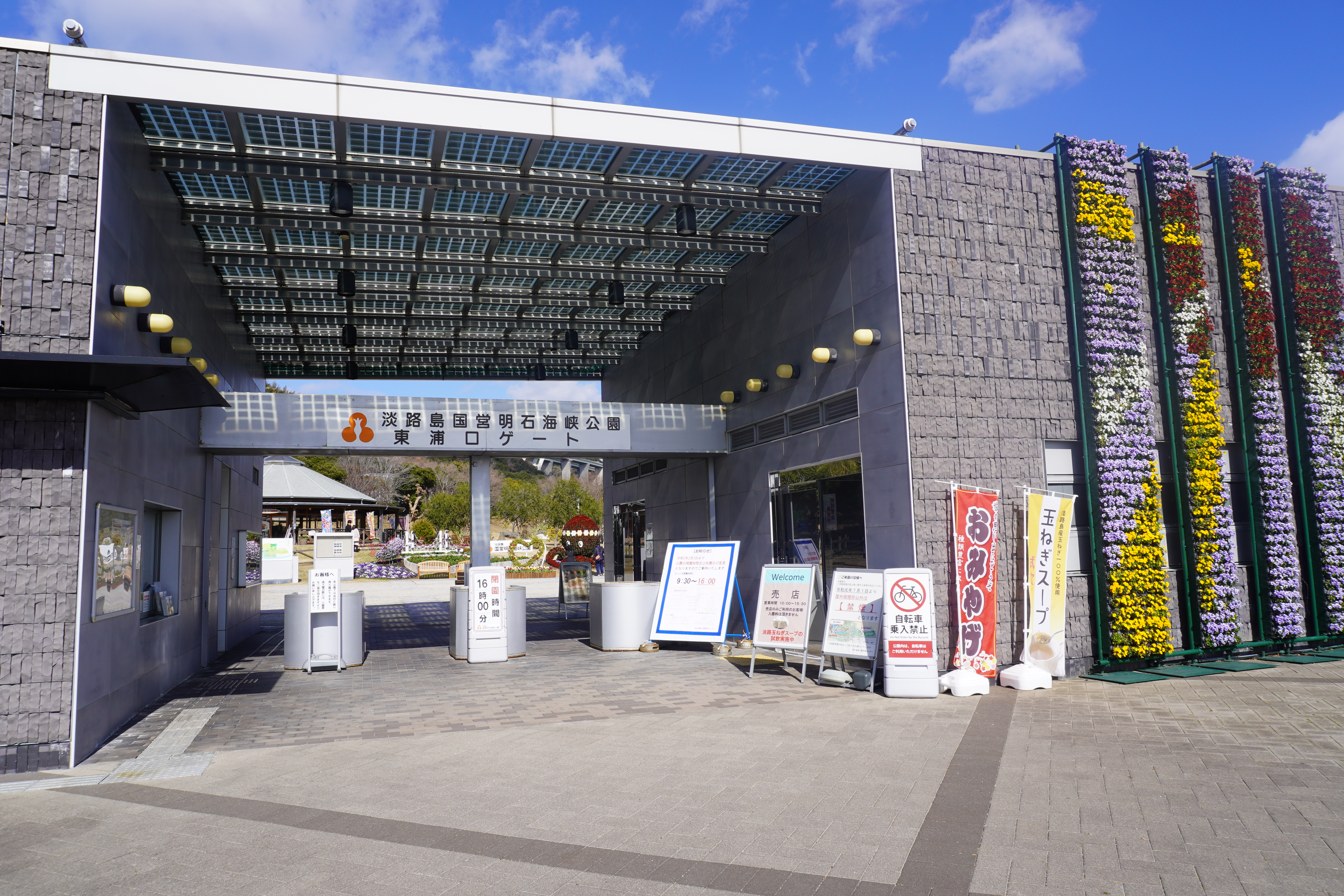 国営明石海峡公園東浦口ゲート